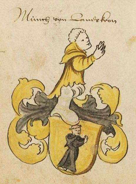 Wappen der Münch von Landskron in Nikolaus Bertschis «Wappenbuch besonders deutscher Geschlechter»